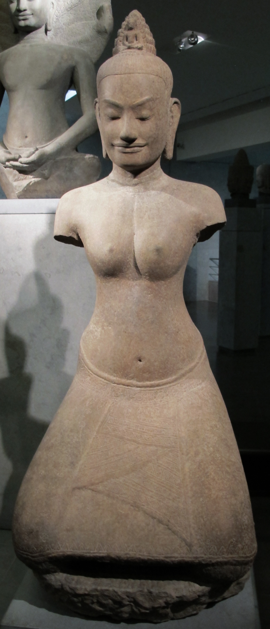 Cambogia, prajnaparamita o tara, da preah khan, stile di bayon, 1190-1210 ca.